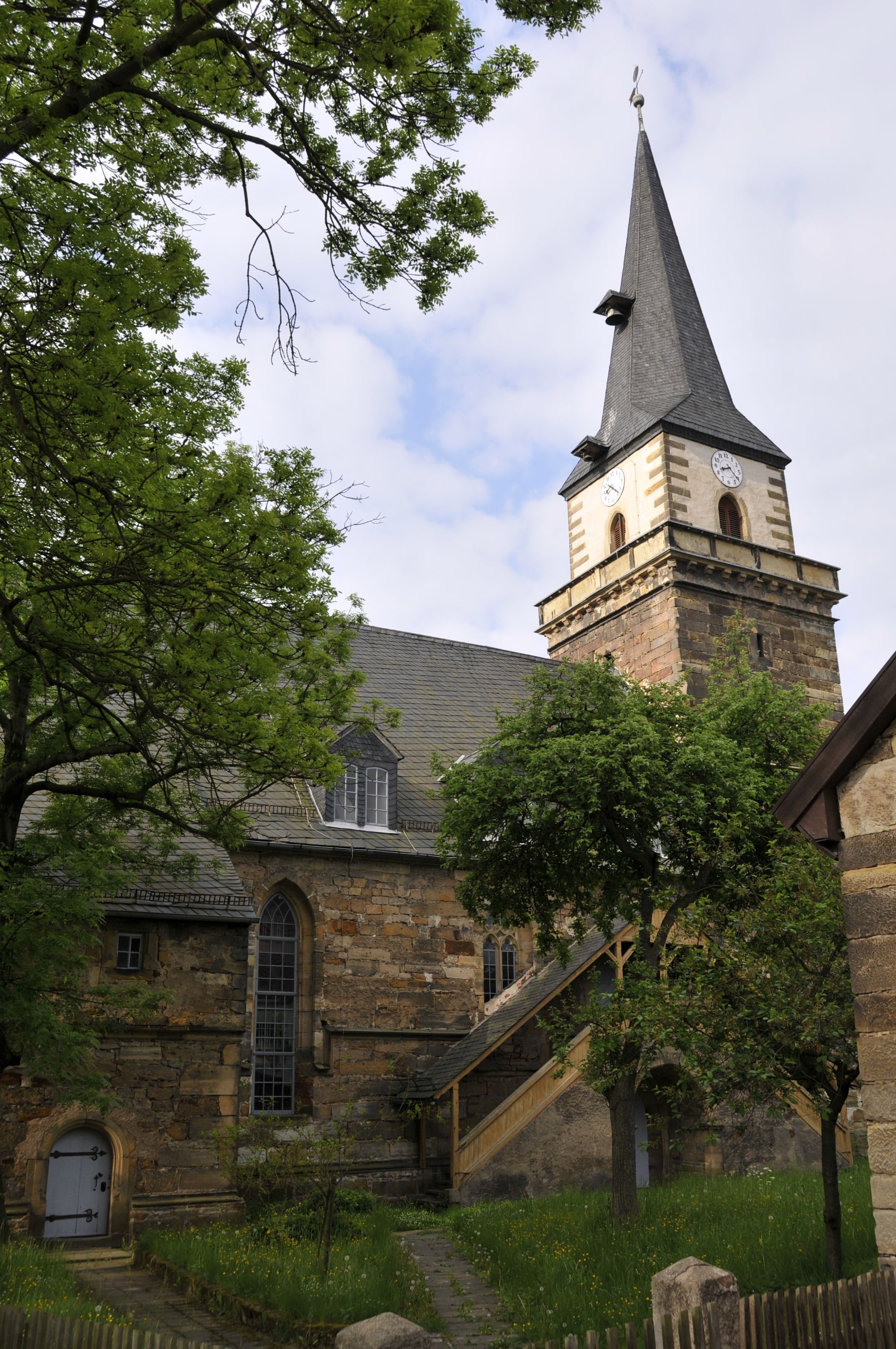 Kirche in Seebergen mit Außentreppe (Nordseite)